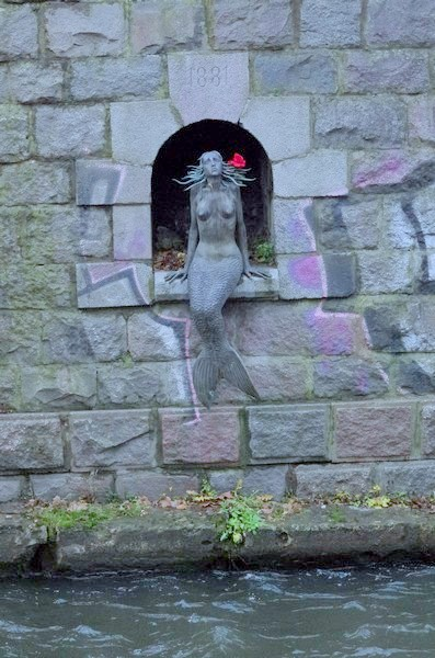 Užupio undinėlė